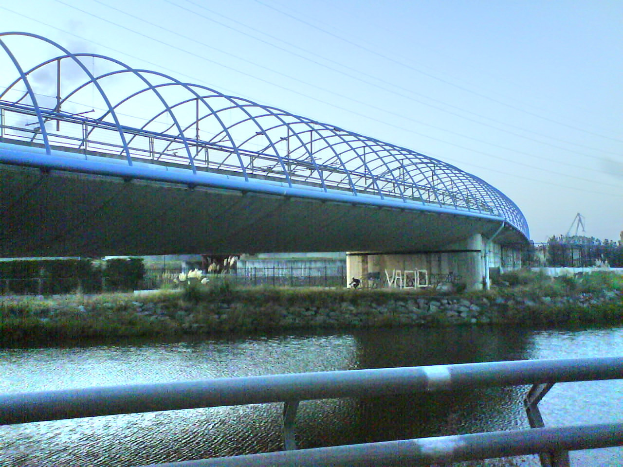 estacion de metro de urbinaga